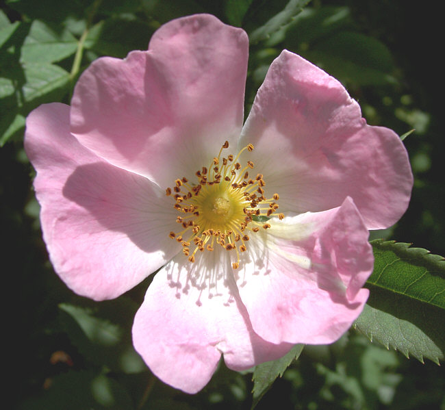 Blüte der Hundsrose (Rosa canina)